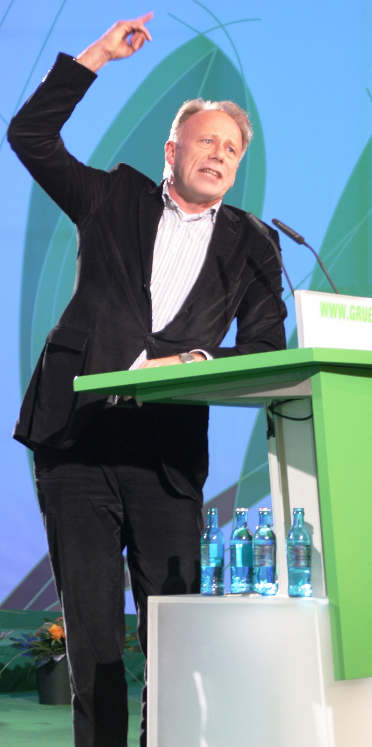 Jürgen Trittin, 1998 - 2005 Umweltminister der Bundesrepublik Deutschland, Anfang Dezember 2006 auf dem Bundesparteitag der Grünen in Köln.